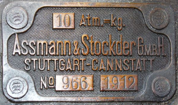 Bad Schussenried Landkreis Biberach Freilichtmuseum Kürnbach Lokomobil von 1912 der Fa. Assmann & Stockder GmbH Stuttgart-Cannstatt Typenschild